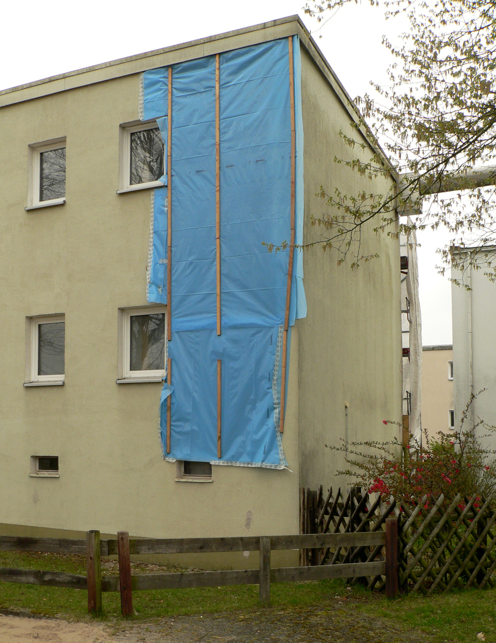 Siedlung Blumläger Feld in Celle, Fassadenöffnung im zweiten Bauabschnitt zur Schadensbegutachtung am Stahlskelett